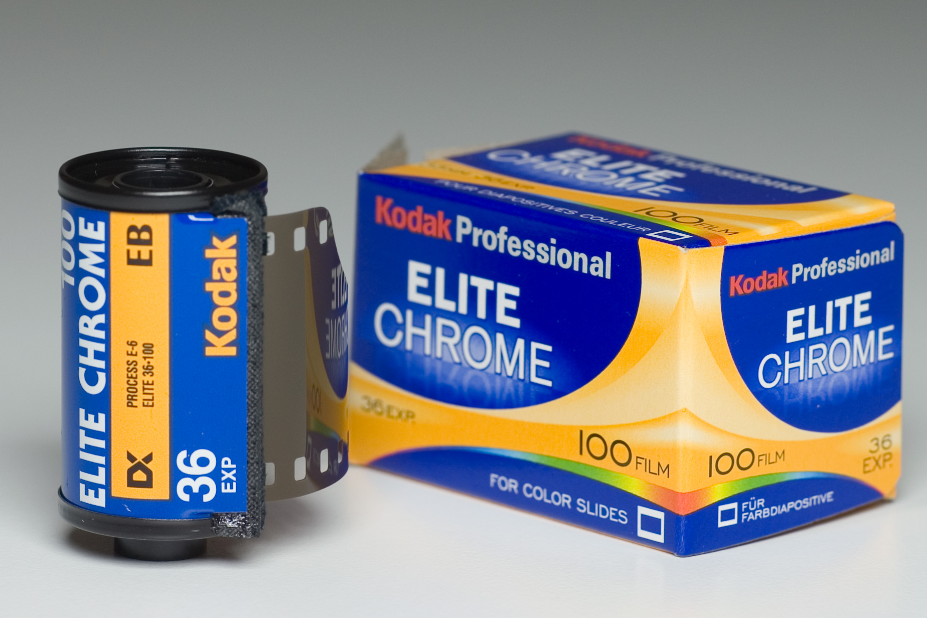 Kodak Elitechrome 100 Diafilm